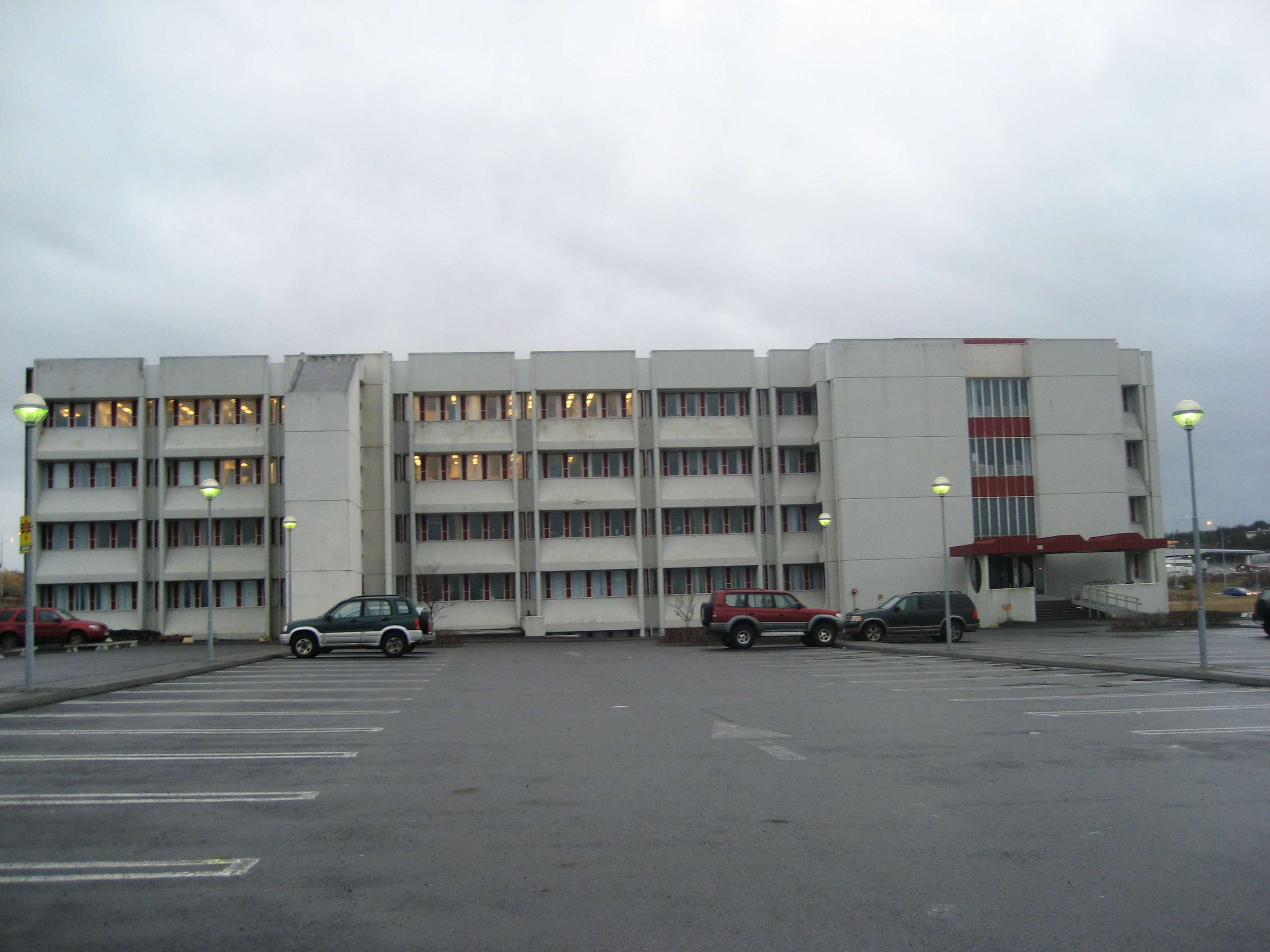 Mynd af læknagarði sem er í eigu Háskóla Íslands.